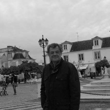 Agustín María García López en Vila Real de Santo António (Portugal)